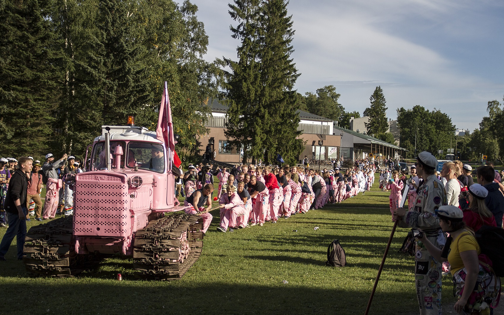 Koneinsinöörikillan fuksit vetämässä köyttä Tela-Weeraa vastaan.